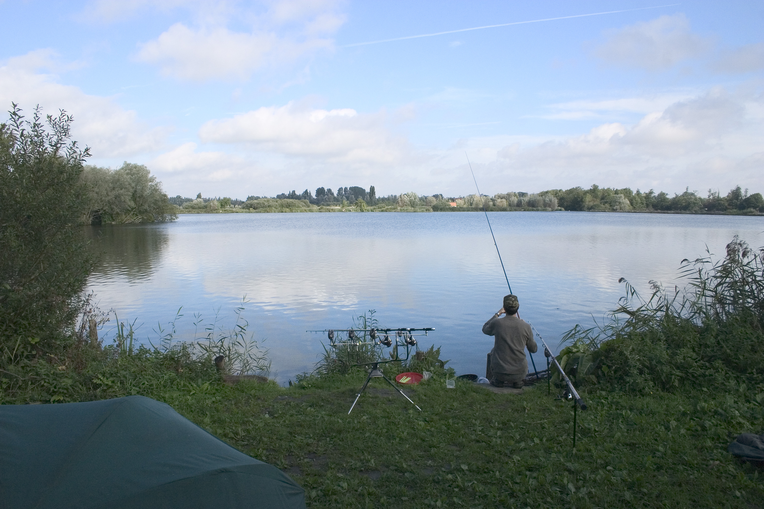 Clairmarais un pêcheur au bord d'un marais